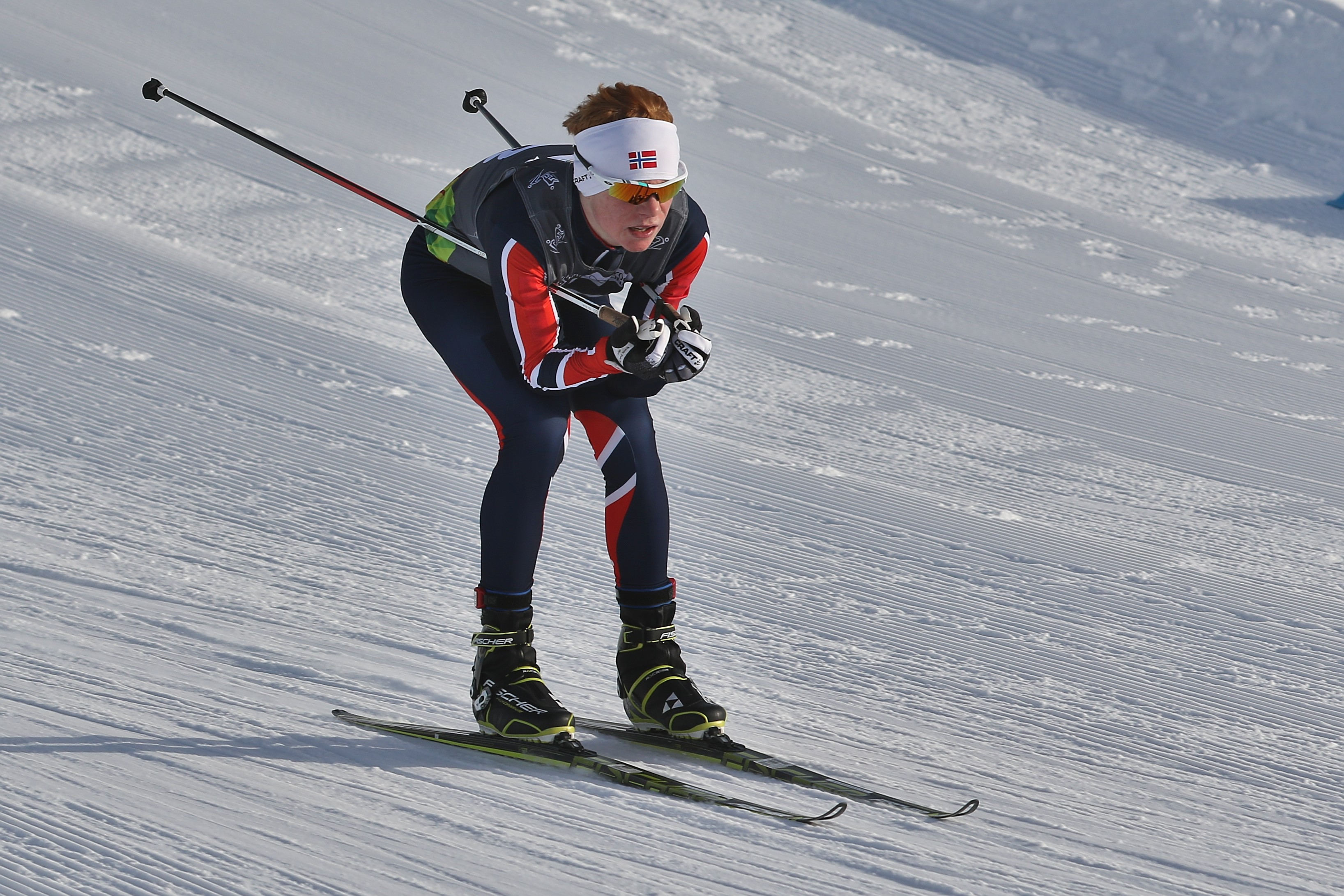 Lillehammer 2016 Combiné nordique - Einar Lurås Oftebro